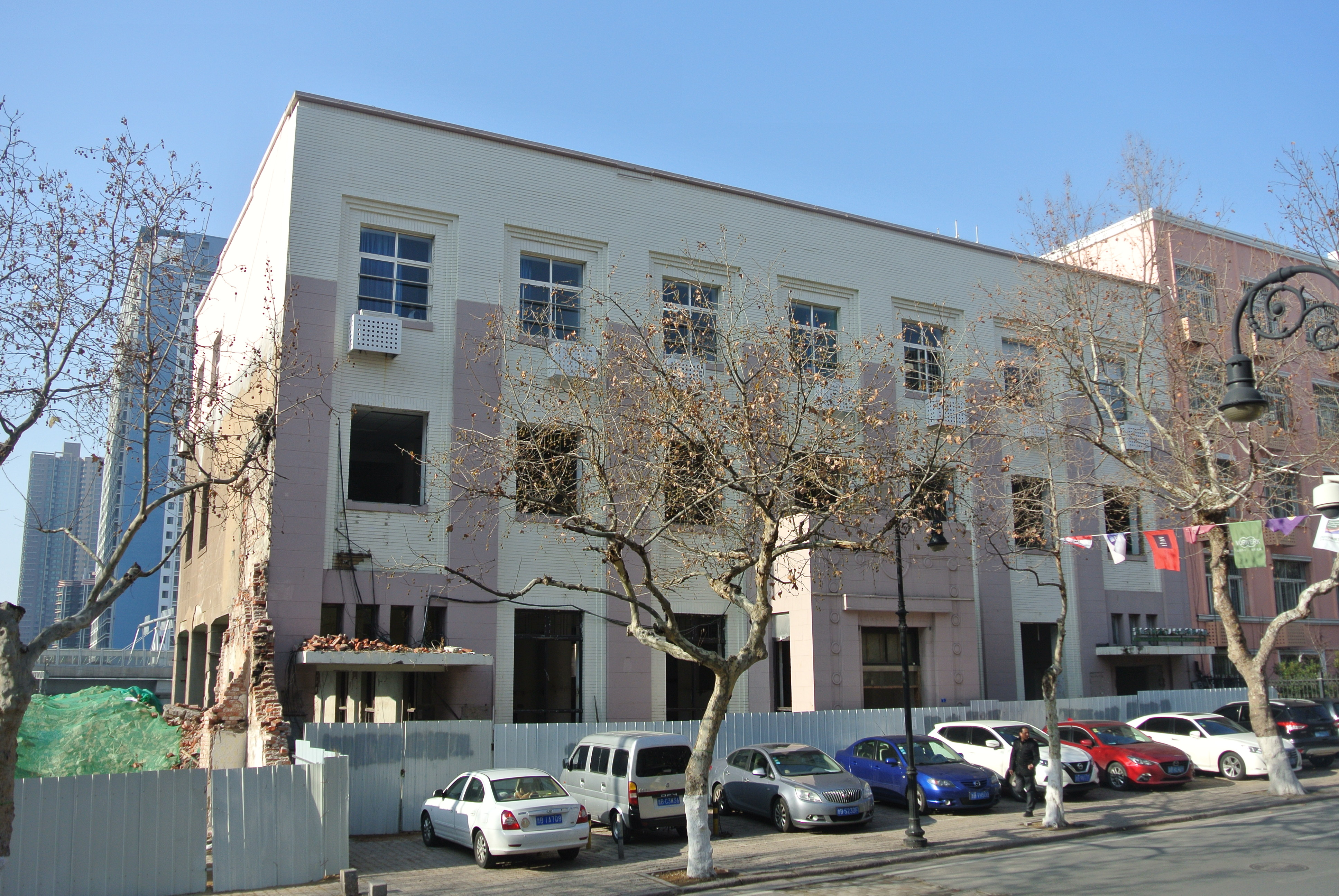 青岛山东起业株式会社旧址